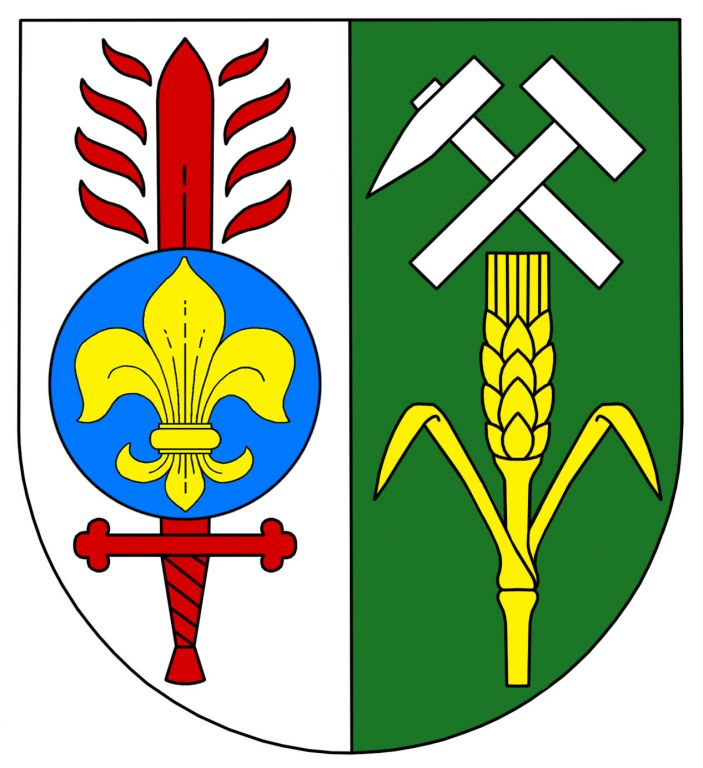 znak obce Meclov